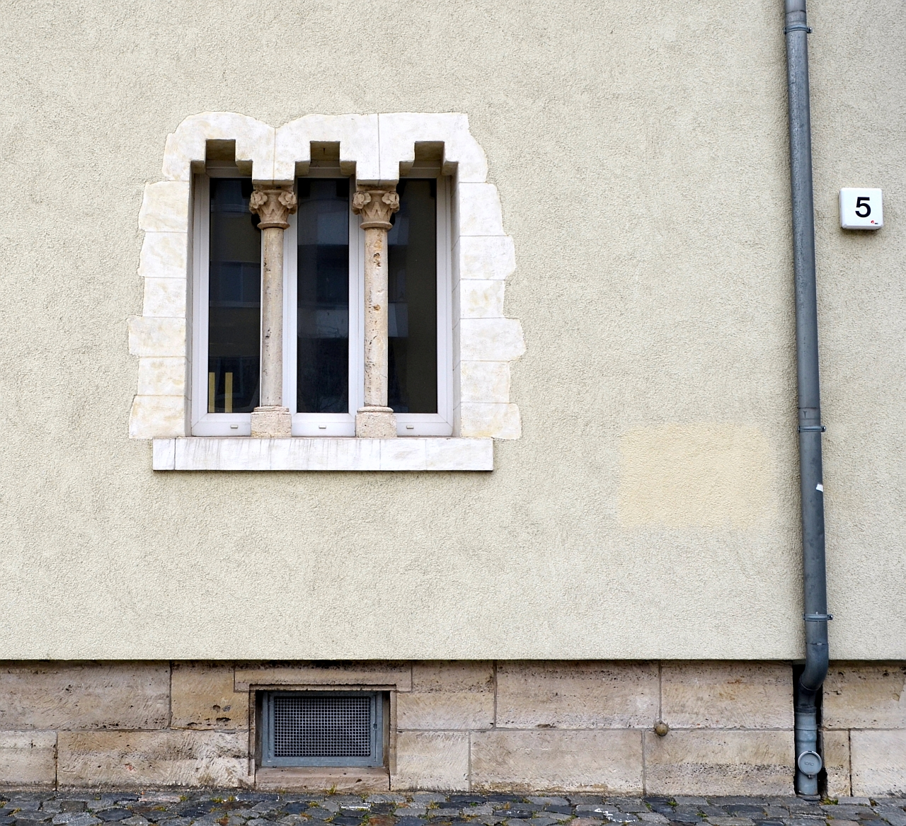 Braunschweig, Wollmarkt 5: Drei gotische Fenster, die einzigen geretteten Überreste aus einer Kemenate, die, wie die gesamte Umgebung des Marktes, beim Bombenangriff auf Braunschweig am 15. Oktober 1944 zerstört wurde.